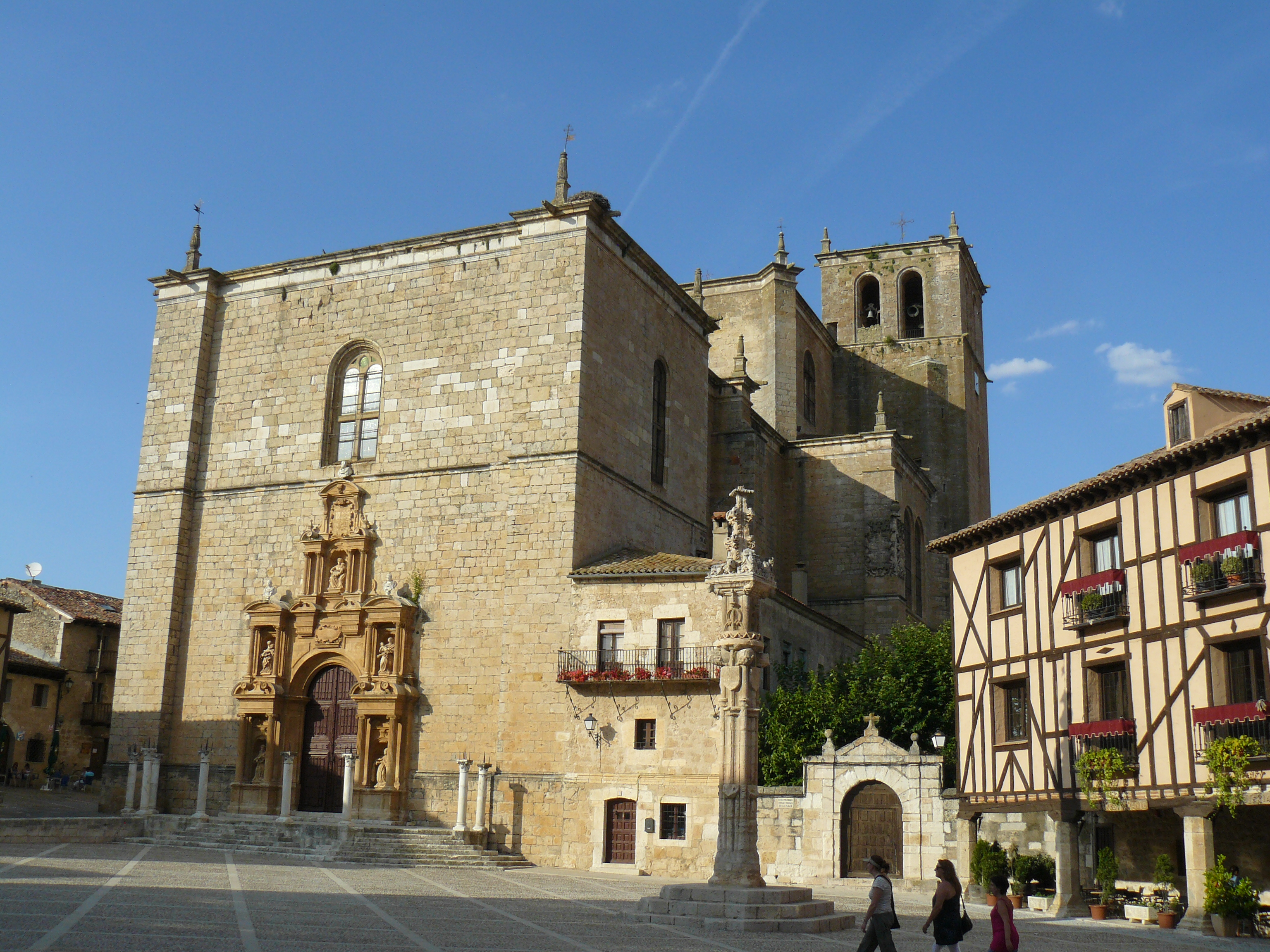 Peñaranda de Duero, Burgos.